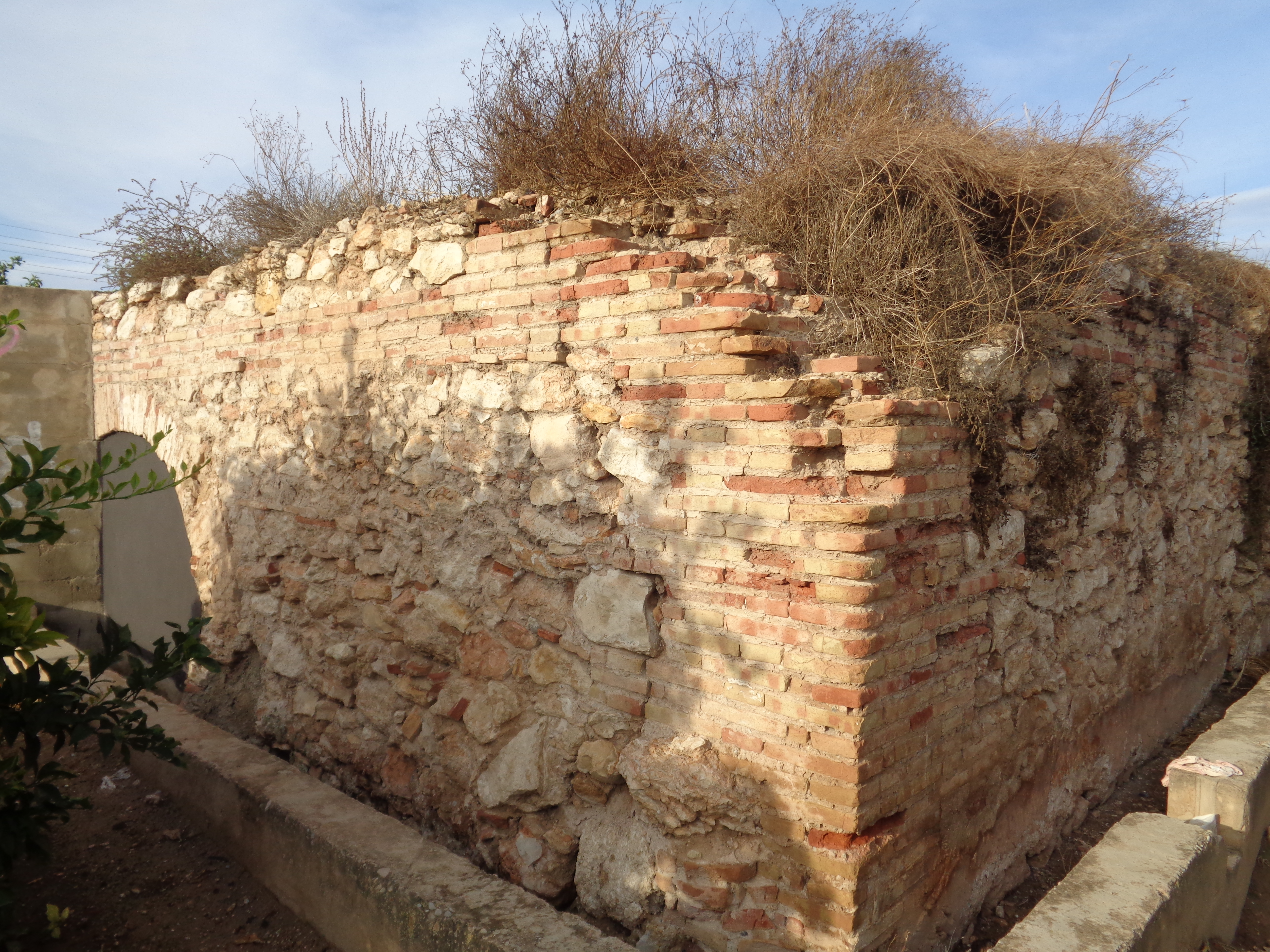 Paterna.